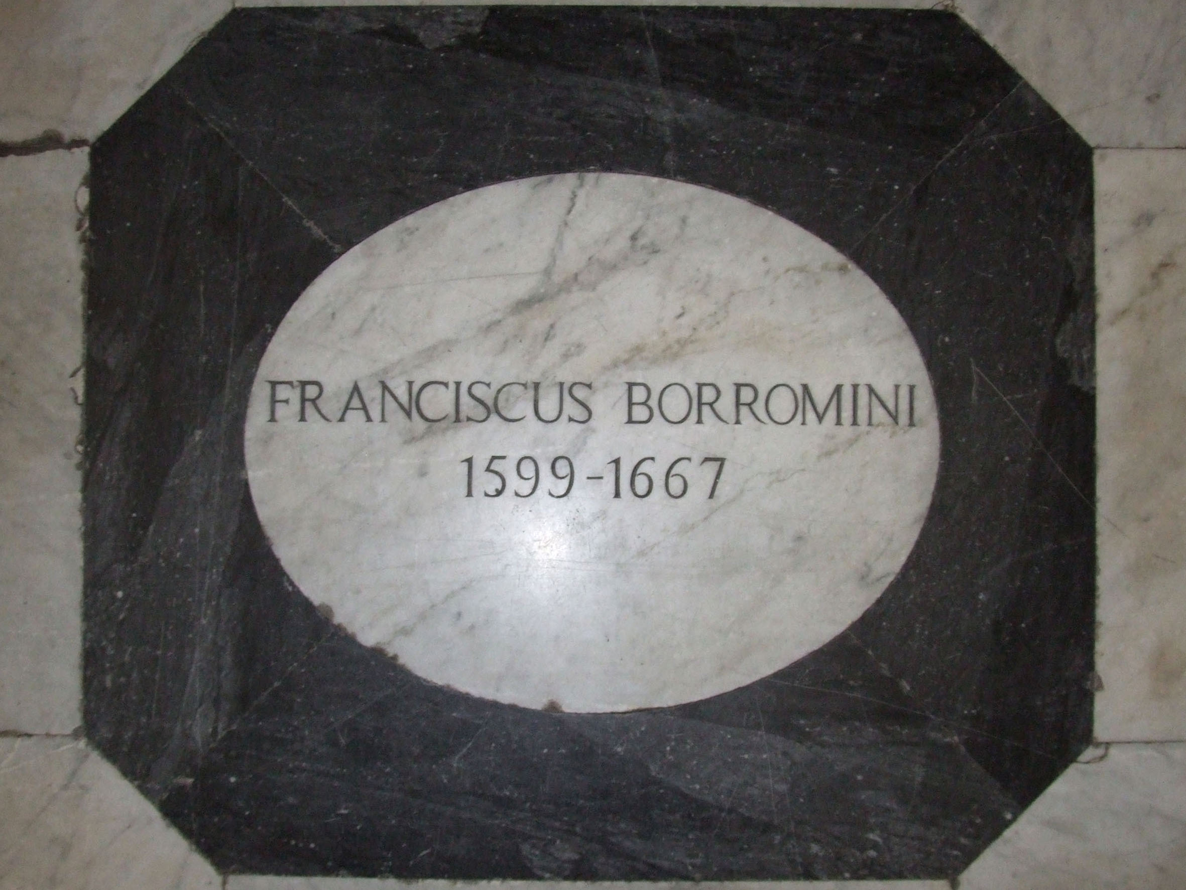 Tomba del Borromini in San Givanni dei Fiorentini, Roma